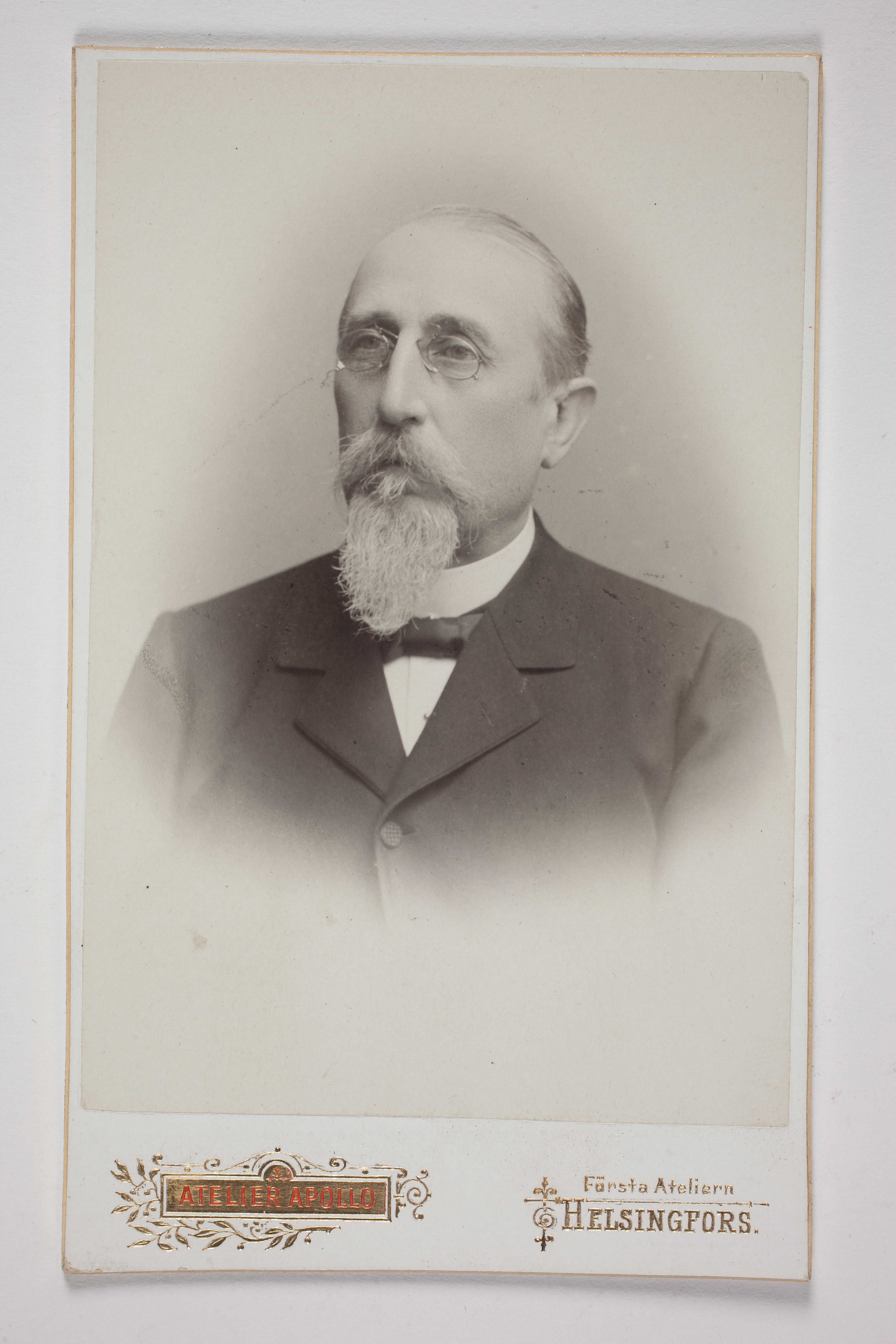 Leo Mechelin 1900.